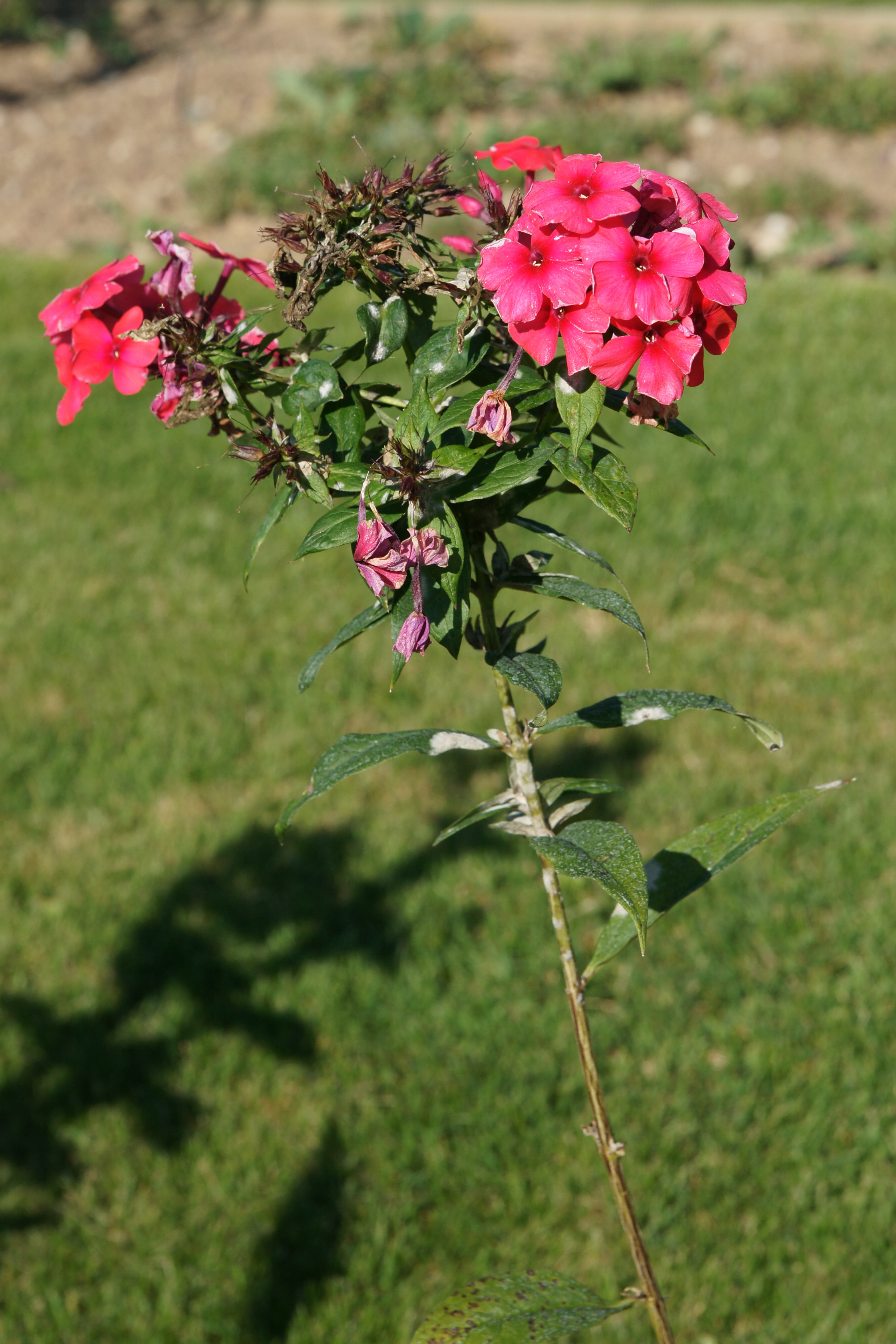 Phlox paniculata (Stauden-Phlox) 'Albert Leo Schlageter'. Herkunft: Arends Maubach. ProSpecieRara-Zierpflanzengarten Elfenau Bern.